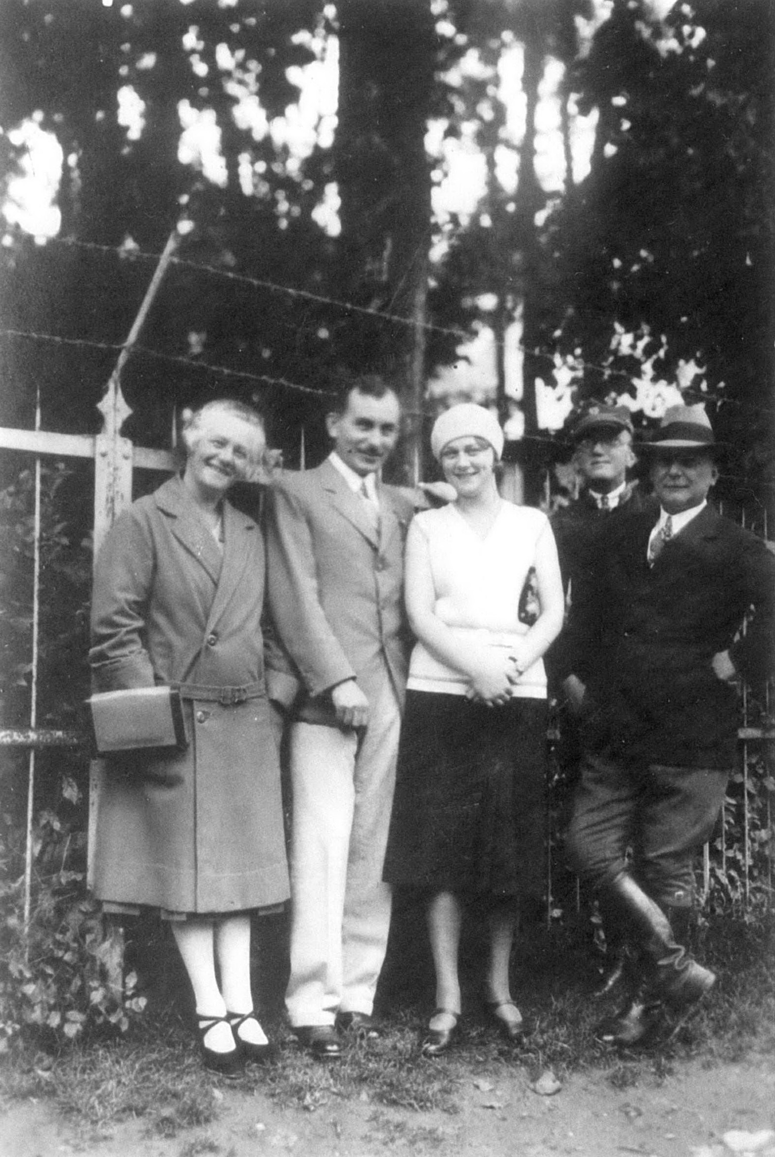 Zdjęcie rodziny dyr. Michała Byszewskiego, Busko-Zdrój, 20 sierpnia 1930, od prawej: - Michał Byszewski, dyrektor Państwowego Zakładu Zdrojowego w Busku-Zdroju -Michał Byszewski, syn -Emilia Byszewska, córka - inż. Jan Rokosz - p.Byszewska, żona